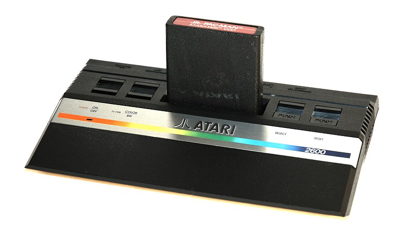 Atari 2600jr, Rev. A